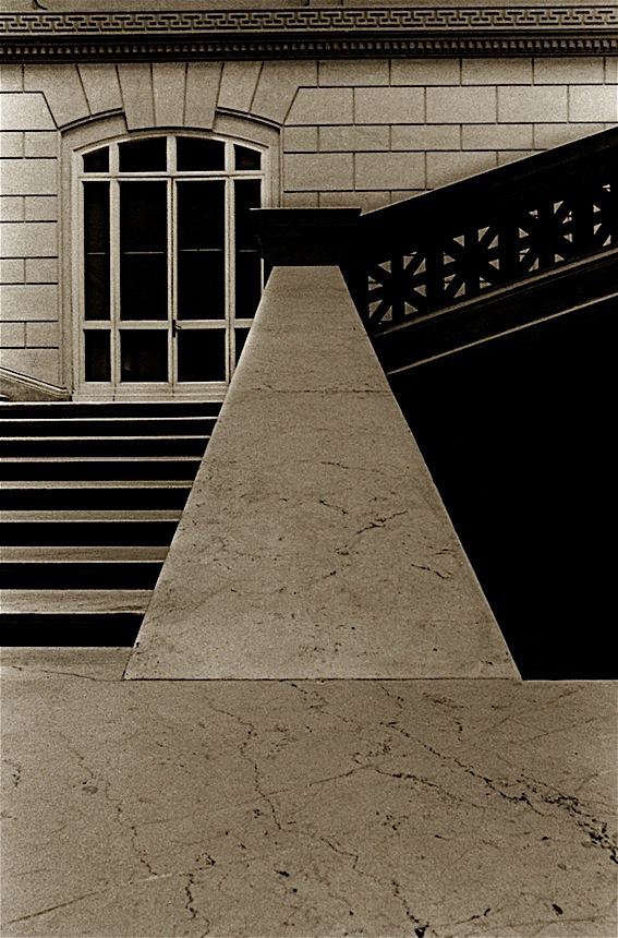 Augusto De Luca - foto nel Palazzo di Giustizia, Roma